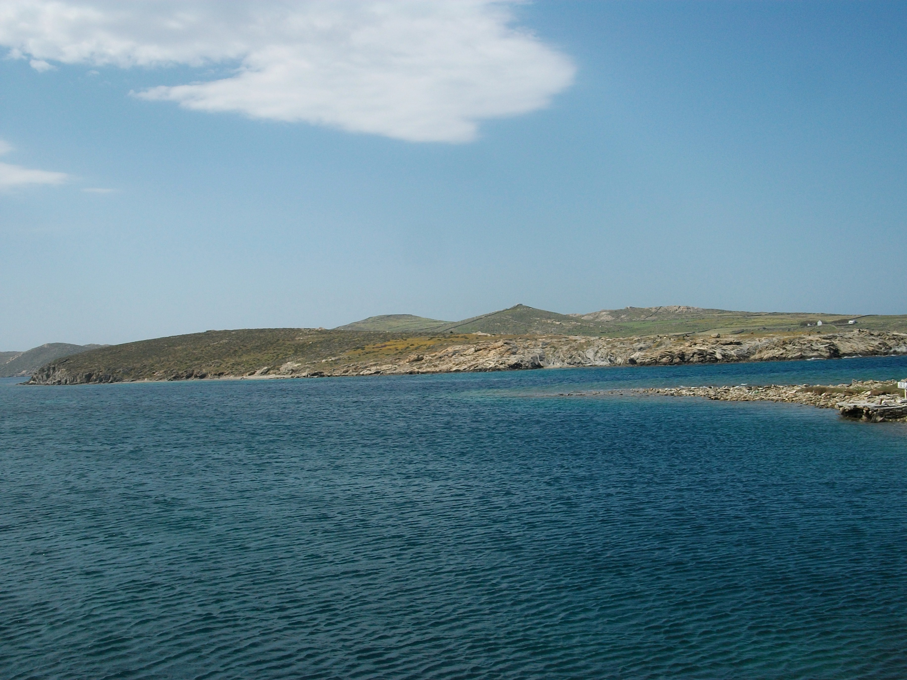 Rínia des de Delos.